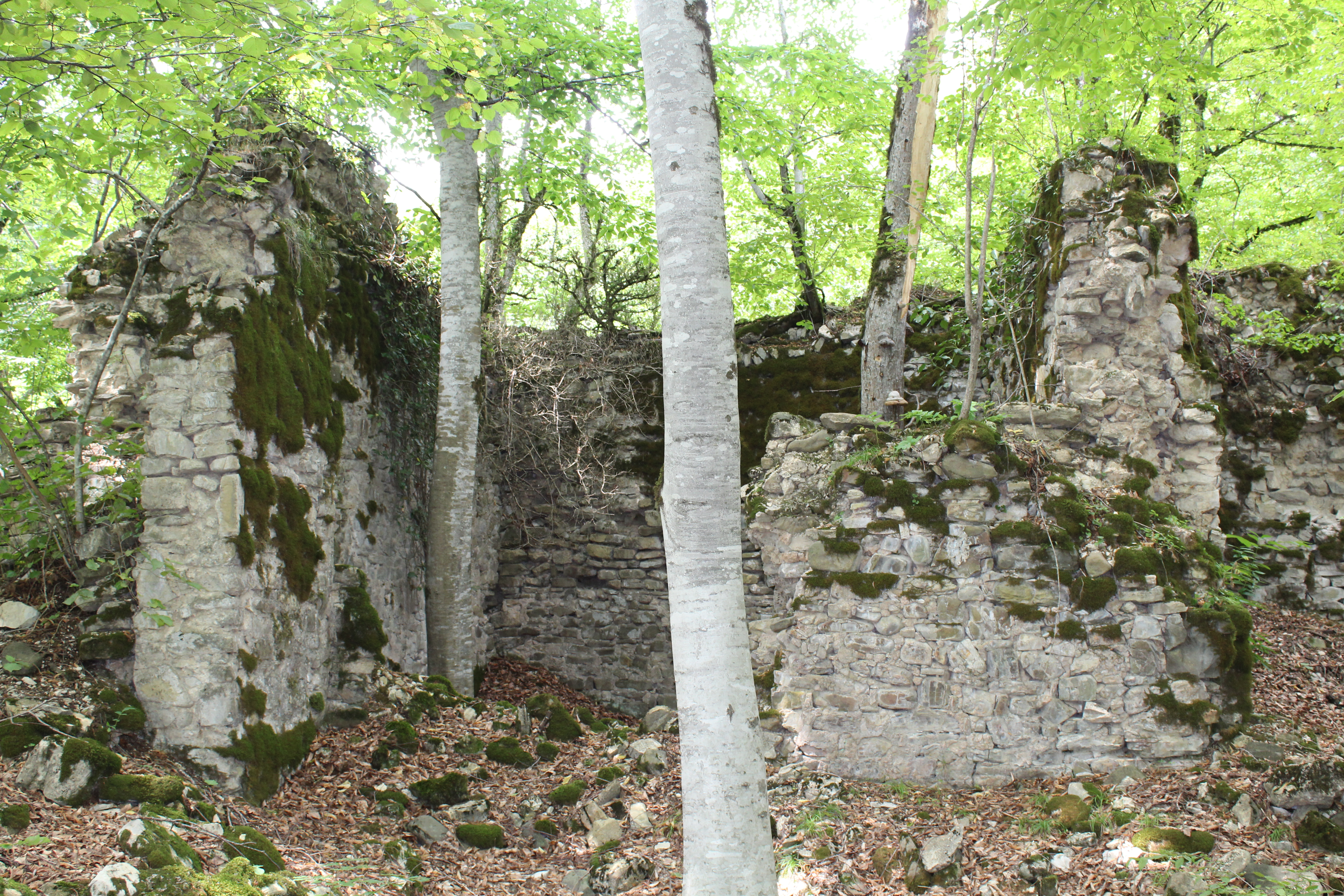 ქაჩალაურის ციხის კოში